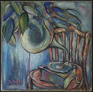 Natura statica realiztata in ulei/panza